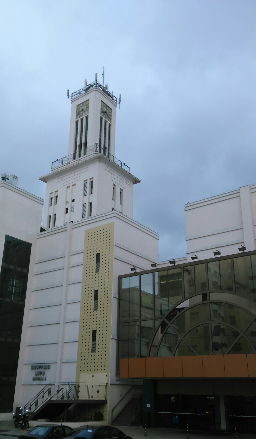 Fachada do shopping Lupo, vista do estacionamento interno.